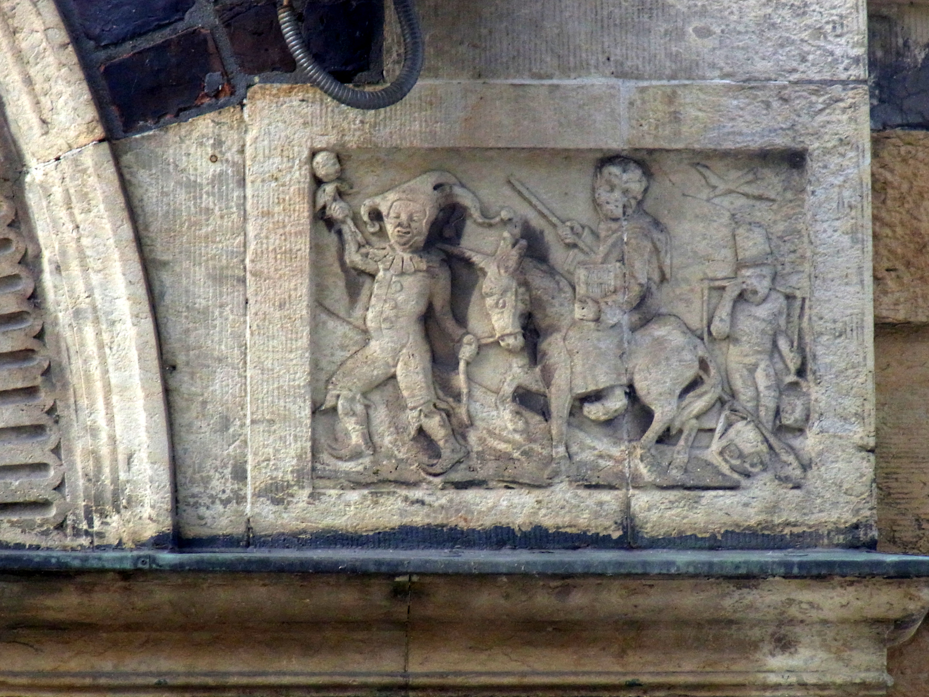 Das Wappen der Familie Mönckeberg zeigt einen Mönch am Fuße eines Berges. Hierauf bezieht sich die Darstellung auf dem Steinrelief. Ein Mönch sitzt auf einem Esel (oder Einhorn), der von einem Narren geführt wird. Er hält im linken Arm ein Buch "Modekritik" und zieht mit der rechten Hand eine Fahne über den Boden. Es ist die Fahne der Maler (mit den drei Schilden). Hinten steht der Hamburger "Hummel" und weint und darüber fliegt eine Möwe. Die Darstellung bezieht sich auf das Gerichtsverfahren, das R. Mönckeberg gegen Hulbe angestrengt hatte. Hulbe hatte im Schaufenster seines Ausstellungsraumes im Hamburger Hof (Jungfernstieg) Zeichnungen des Simplicissimus-Zeichners Ferdinand von Rezniček ausgestellt, die Mönckeberg obszön fand, so dass er Hulbe, den er persönlich kannte, wegen Erregung eines öffentlichen Ärgernisses anzeigte. Das Gericht verurteilte Hulbe zu einer Strafe von 50 Mark.